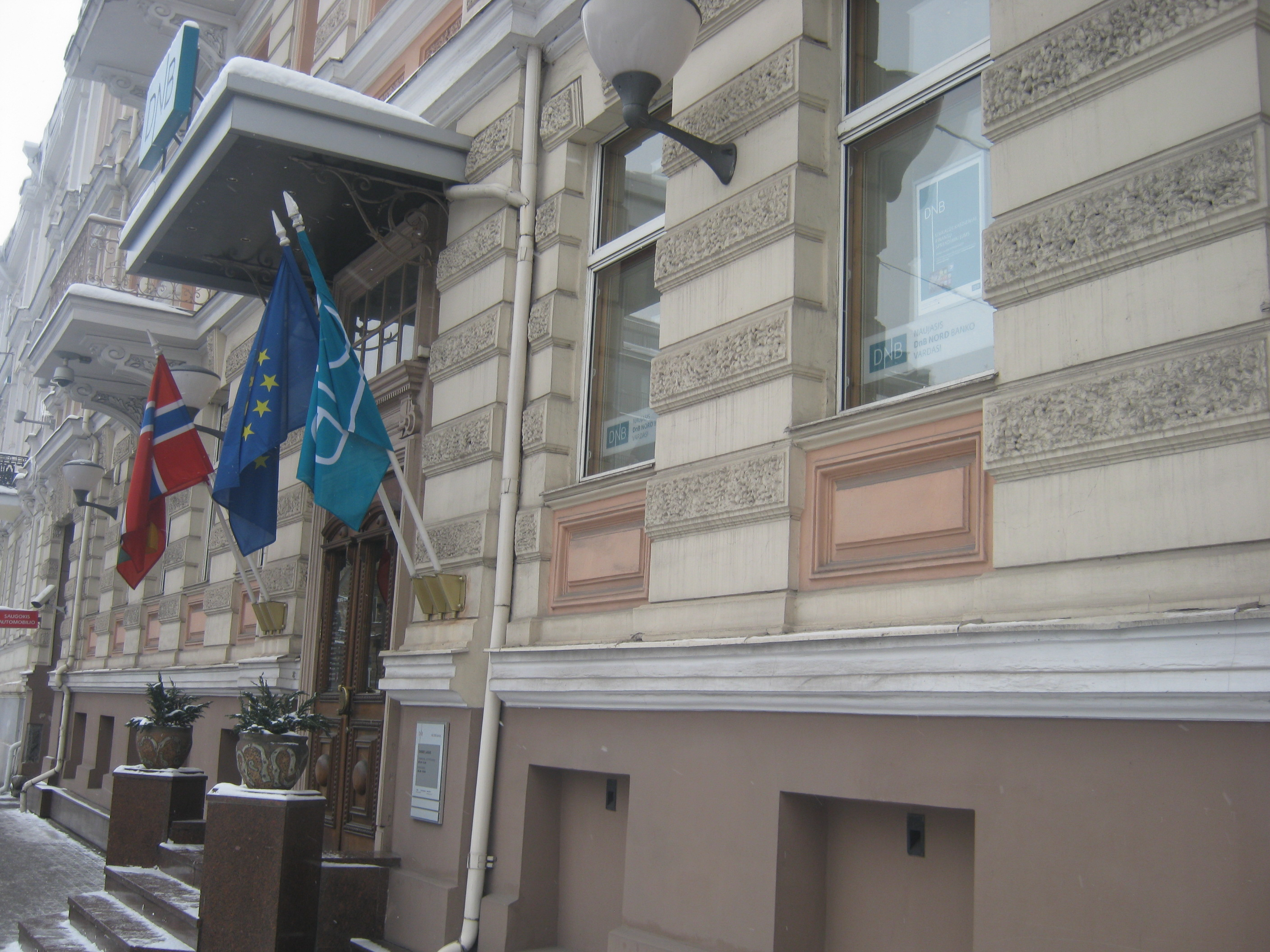 Vilnius